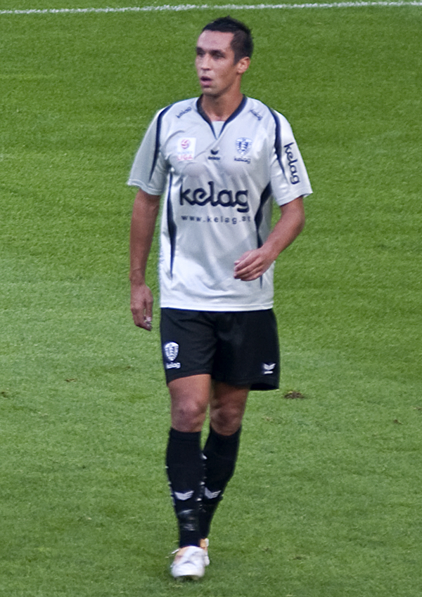 Martin Živný, SK Austria Kärnten, beim Spiel gegen Red Bull Salzburg am 26.09.2009